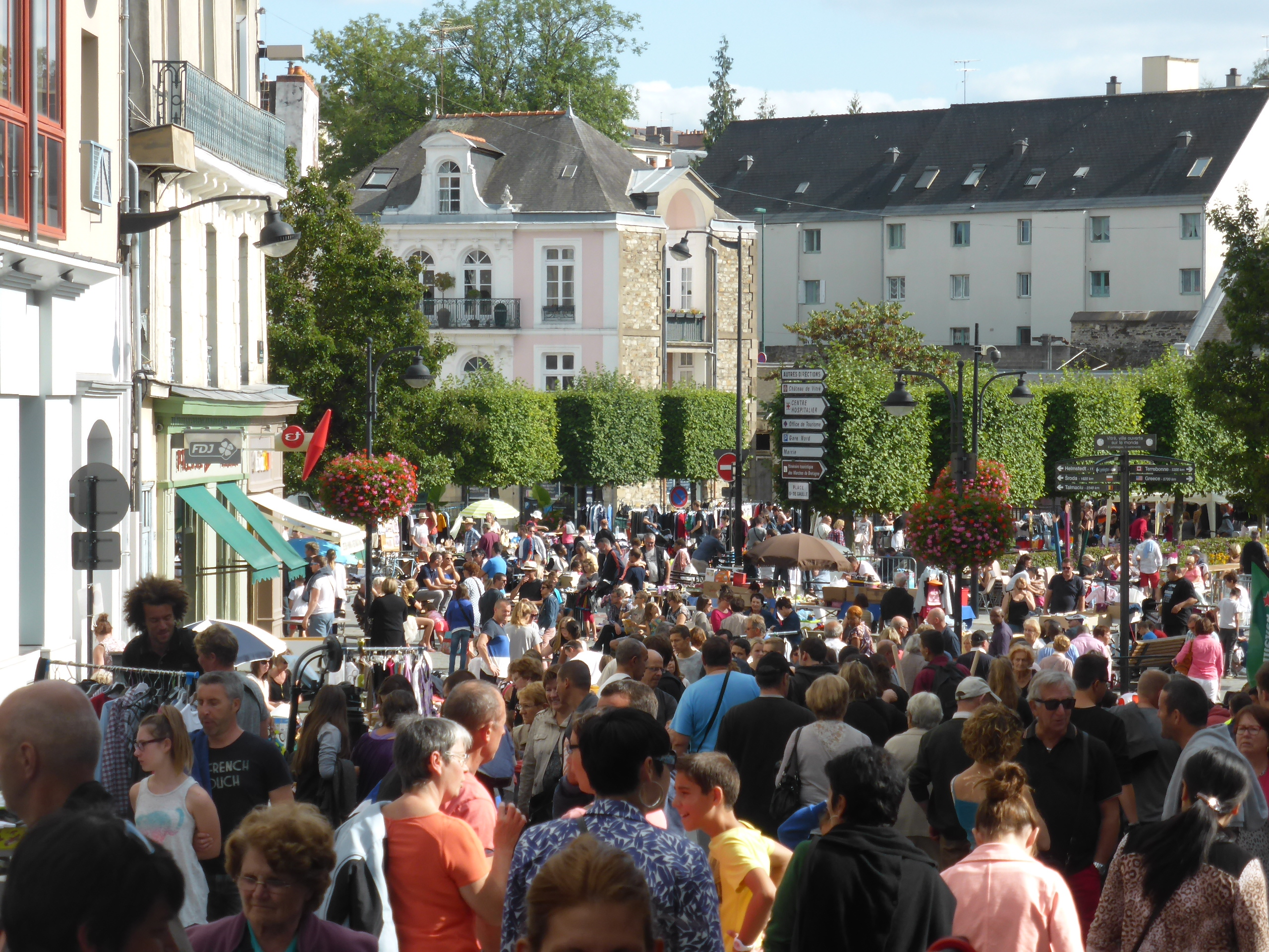 Grande braderie de Vitré (35), premier week end de sept